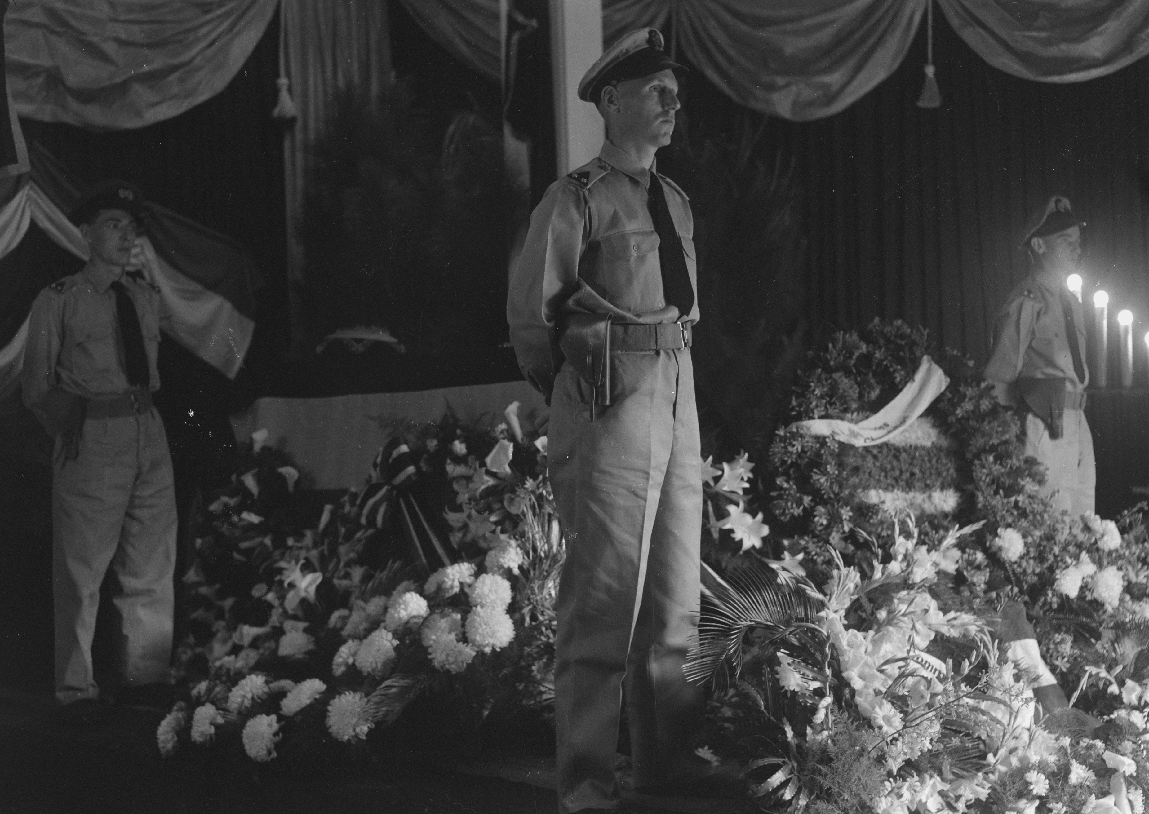 Collectie / Archief : Fotocollectie Dienst voor Legercontacten Indonesië Reportage / Serie : [DLC] Overbrenging stoffelijk overschot Siamese prins Paribatra Beschrijving : Op 28 sept. werd het stoffelijk overschot van Prins Paribatra van Siam, die gedurende de Japanse bezetting te Bandoeng was overleden, per KLM-constellation naar Siam teruggebracht. Hiertoe was een speciale Missie uit Siam, bestaande uit Hoogwaardigheidsbekleders, w.o. kroonprins Chumbhot, prins Bandhuma, de echtgenote van de overledene, prinses Siriratma en vele andere hoge autoriteiten naar Indonesie gekomen, teneinde de overleden prins op zijn laatste reis te begeleiden. Datum : 28 september 1948 Locatie : Indonesië, Nederlands-Indië Fotograaf : Haasjes / DLC Auteursrechthebbende : Nationaal Archief Materiaalsoort : Negatief (zwart/wit) Nummer archiefinventaris : bekijk toegang 2.24.04.03 Bestanddeelnummer : 14548